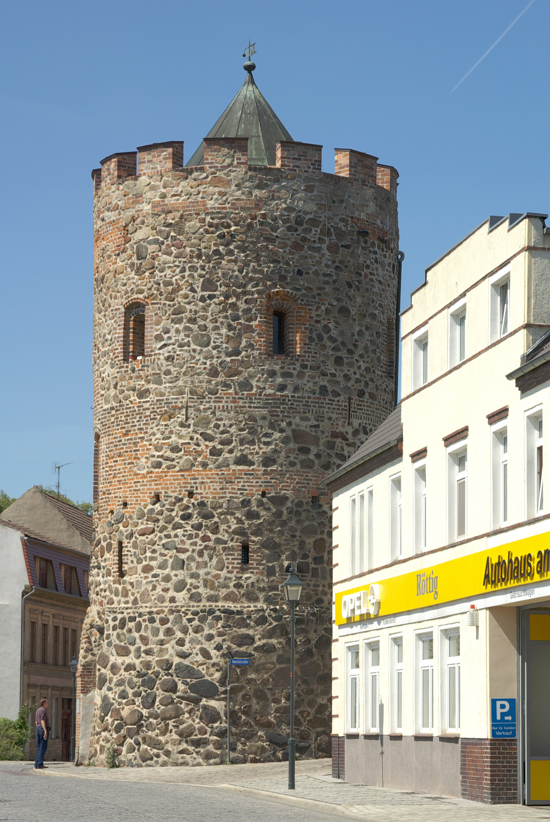 Berliner Torturm in Burg(Magdeburg)